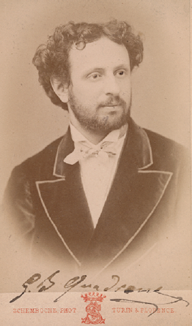 Giovanni Battista Quadrone